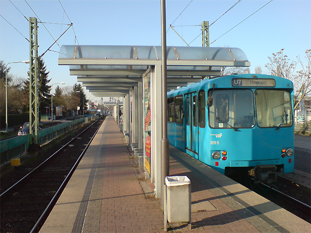 U-Bahnstation Hausen, Frankfurt am Main, U7 Richtung Enkheim, im Hintergrund: Buslinie 72 Richtung Roedelheim Bahnhof